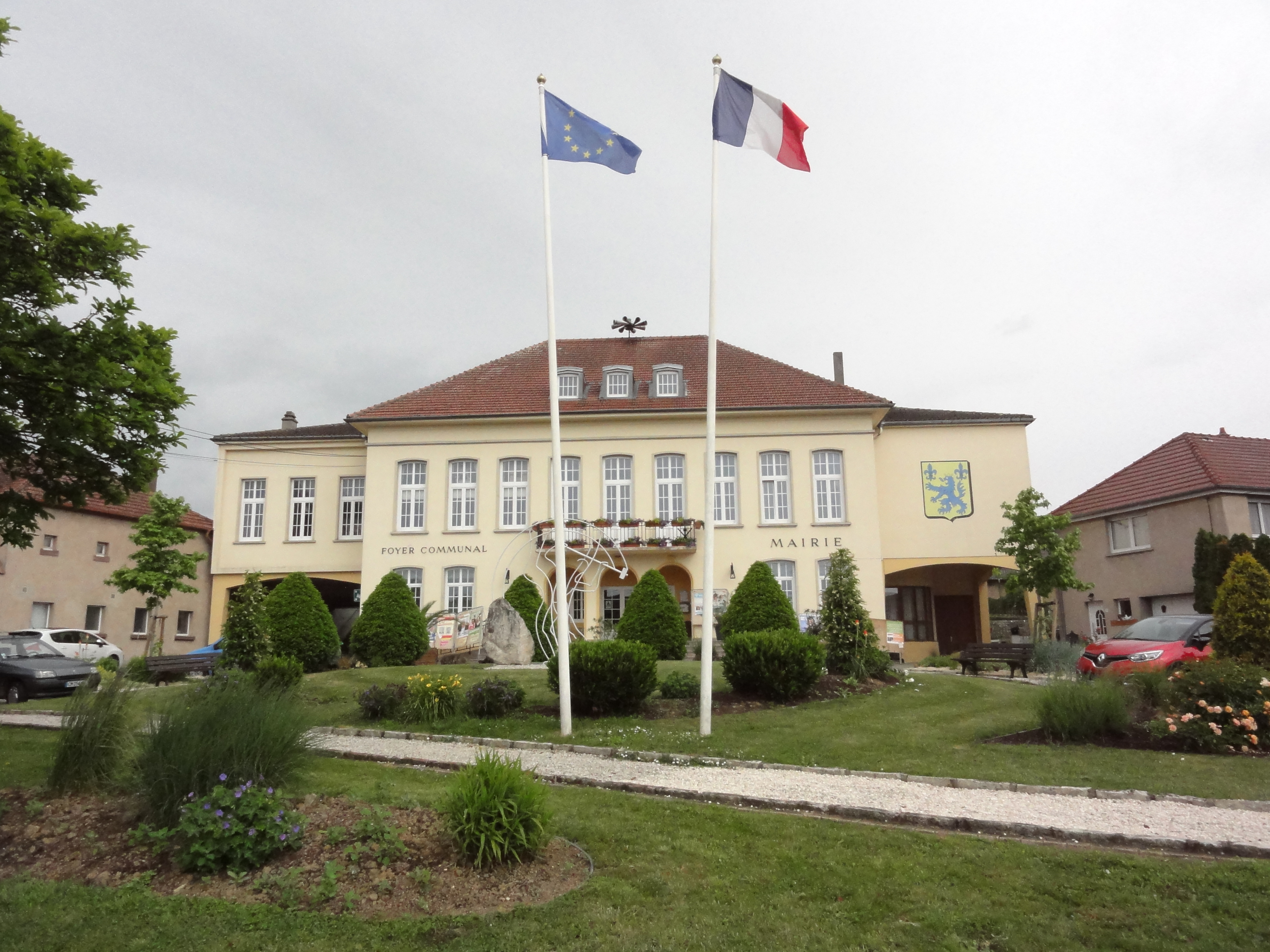 Héming (Moselle) mairie